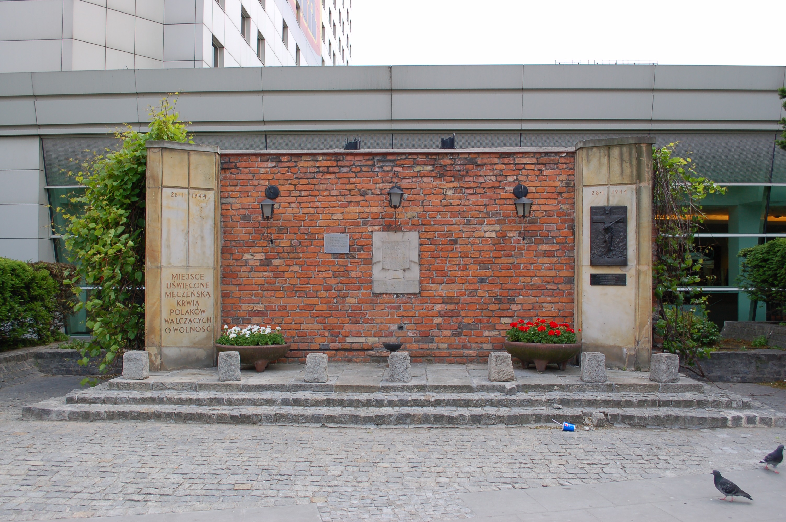 Gedenk Marszalkowska Jerozolimskie